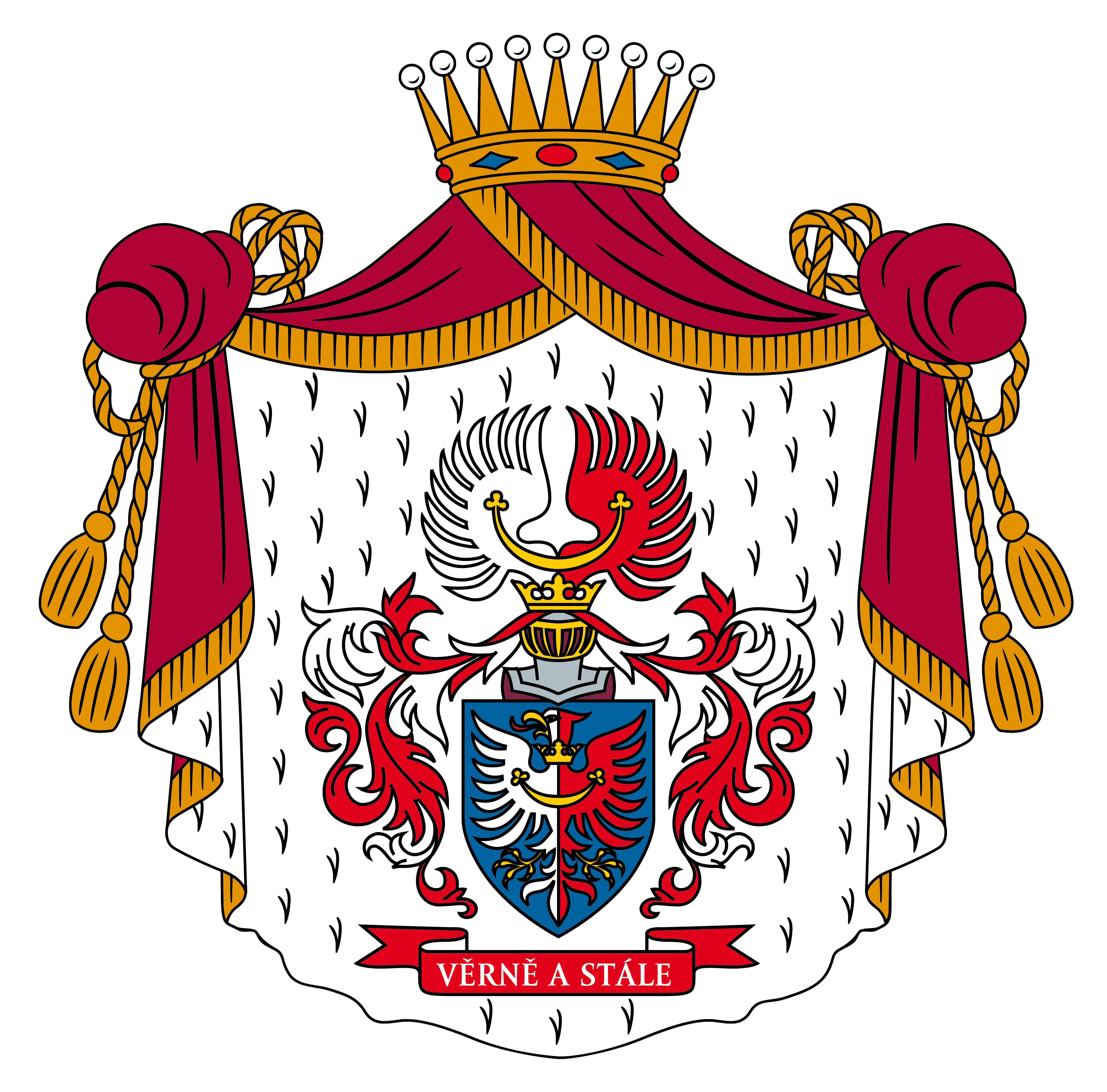 Erb Verně a stále